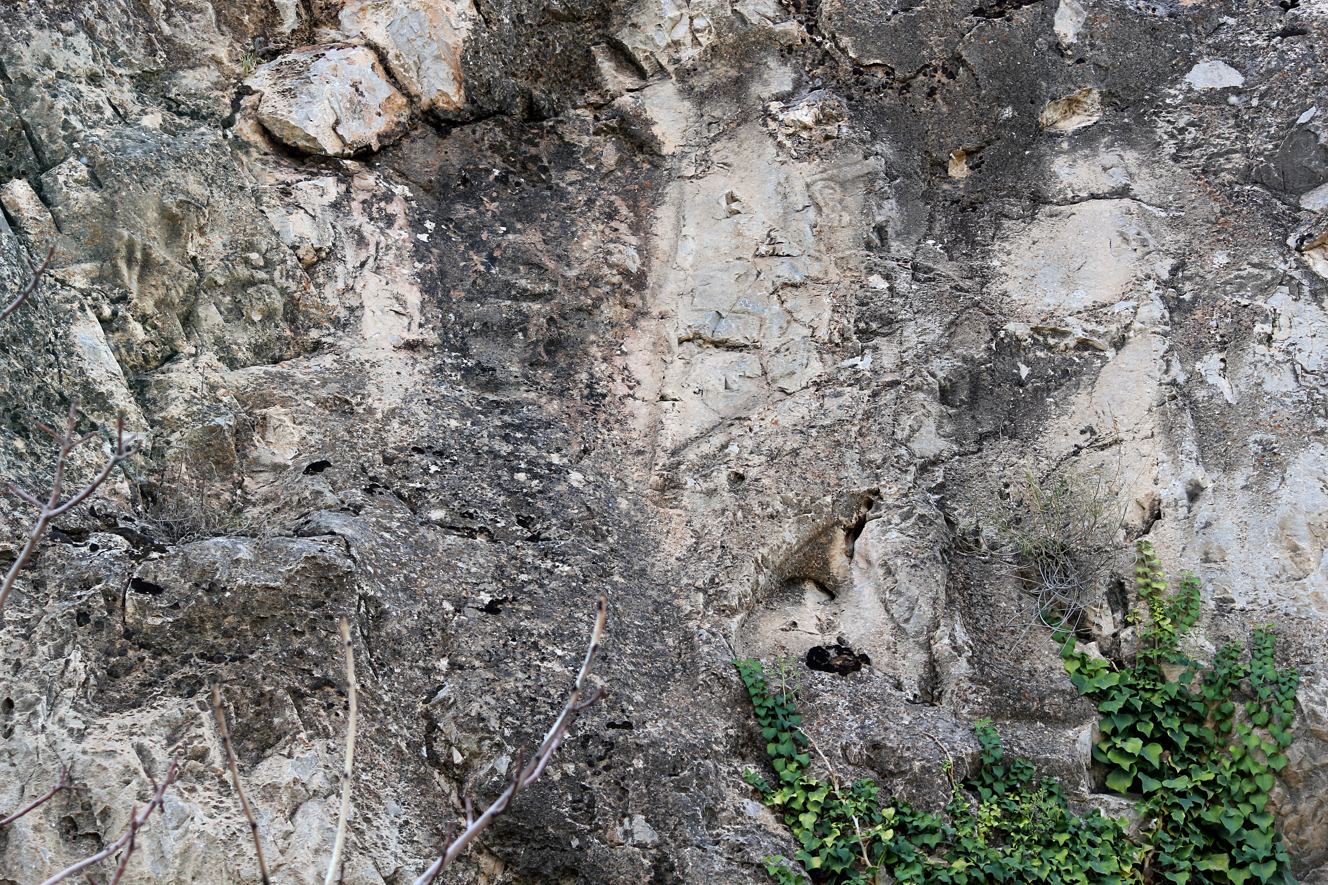 Hethitisches Felsrelief von Hatip bei Konya, Zentraltürkei